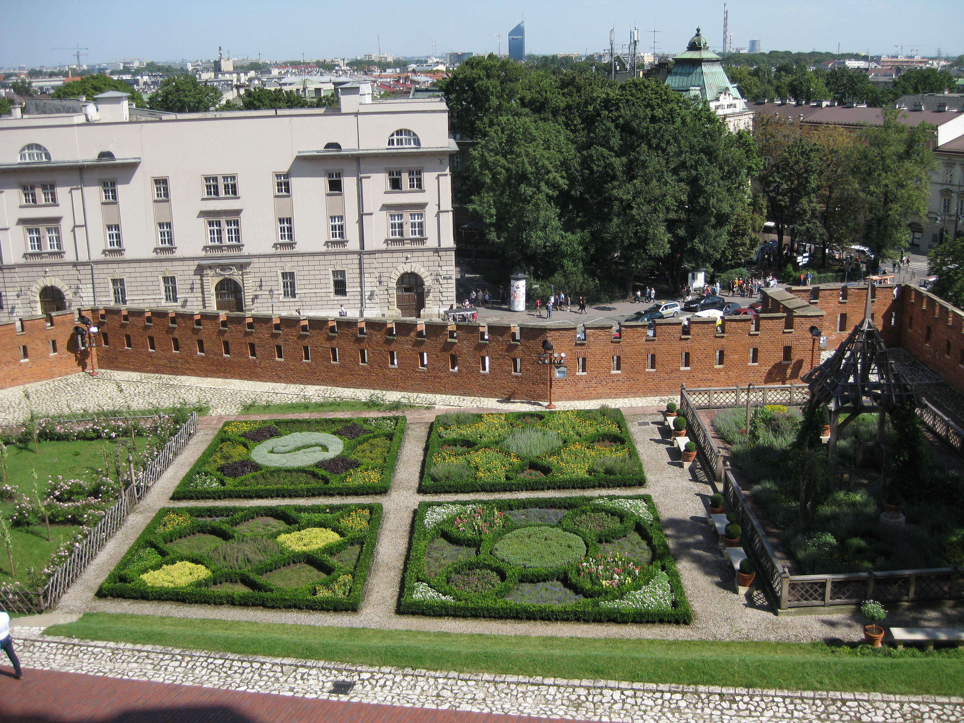 Royal Garden in Kraków